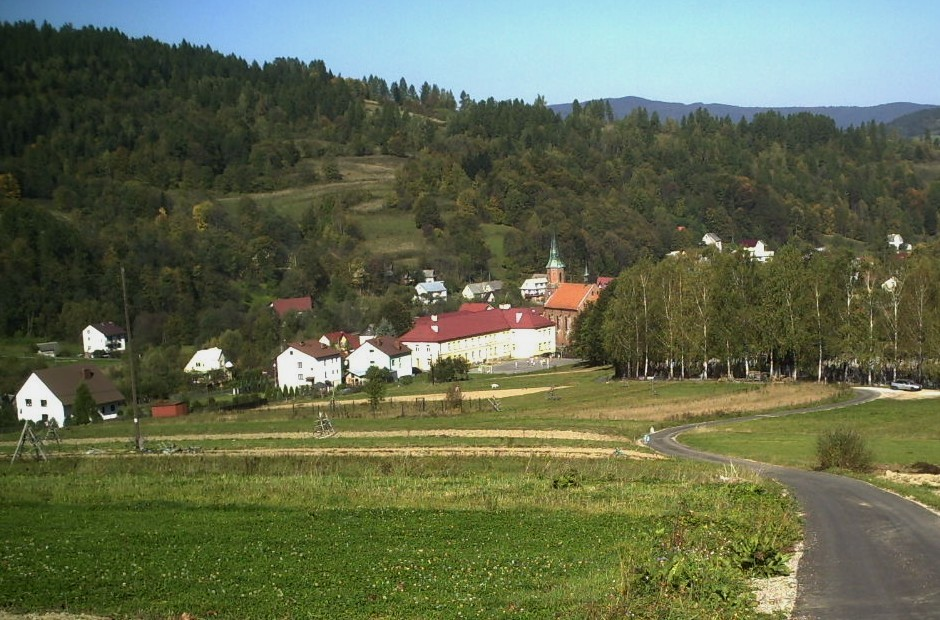 Widok na centrum.My own work.2006.Suwaj Wladyslaw.(The centre of Stryszawa)